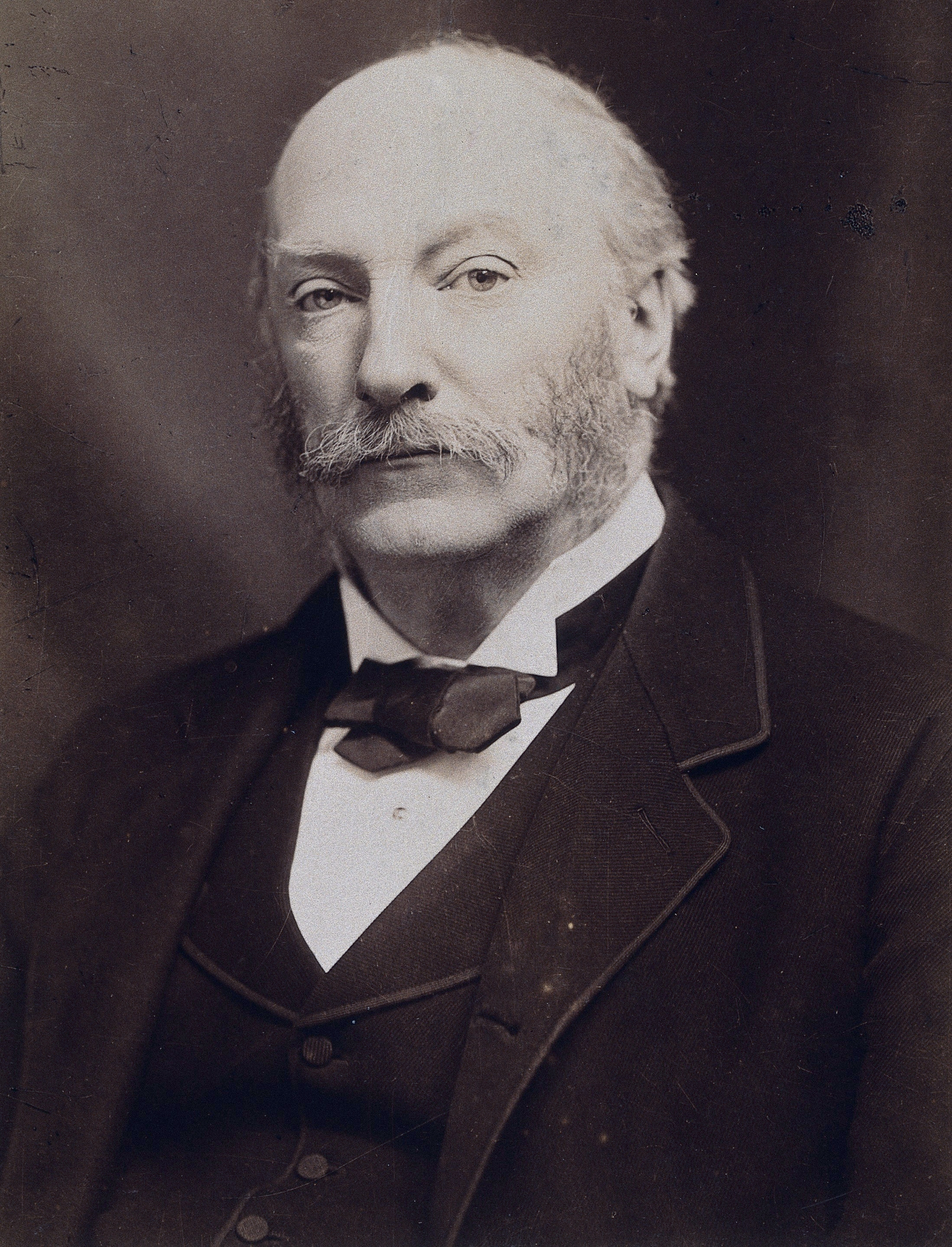 ჯონ უილიამ რელეი